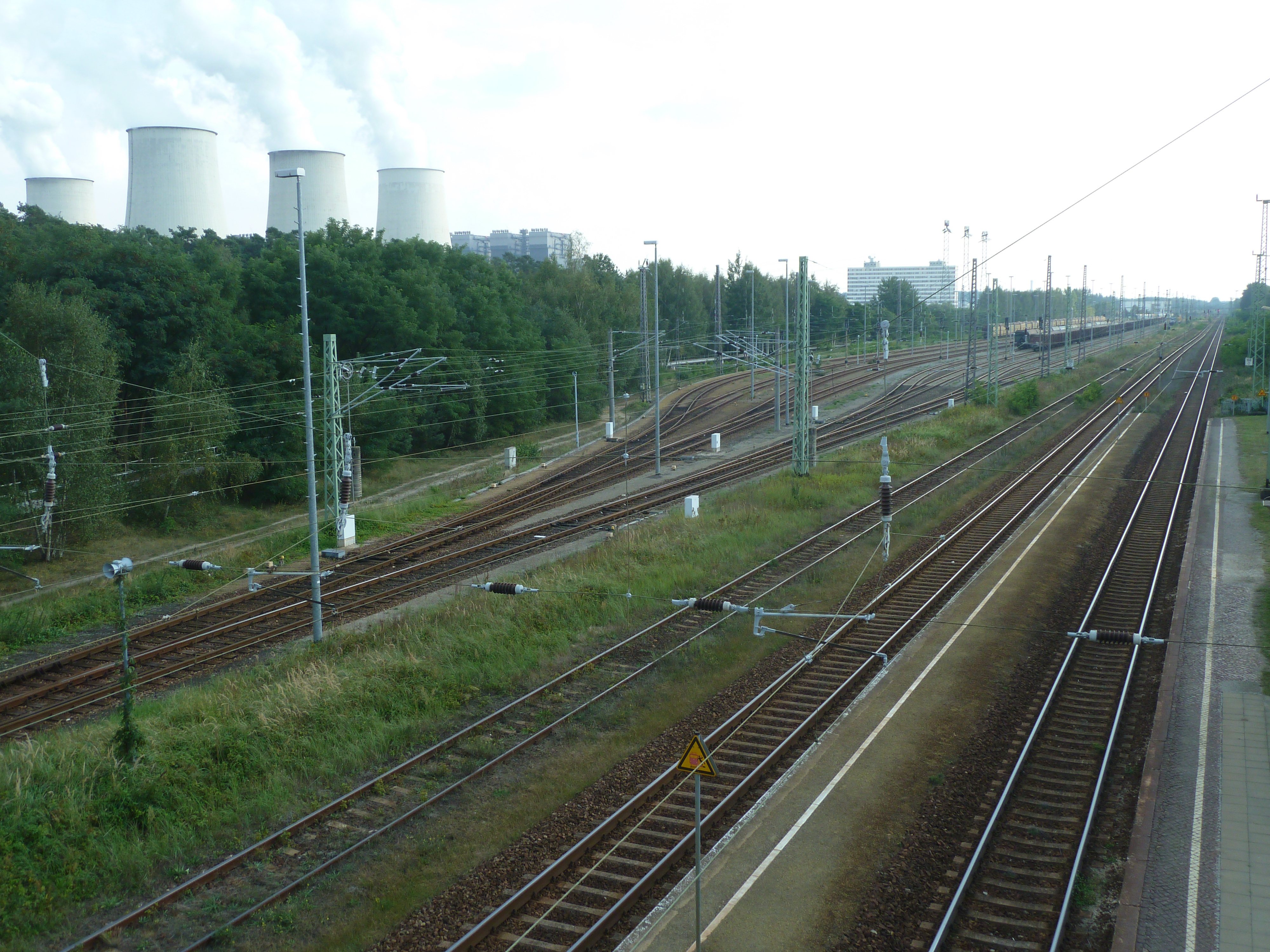 Bahnhof Peitz Ost, Gleisanlagen